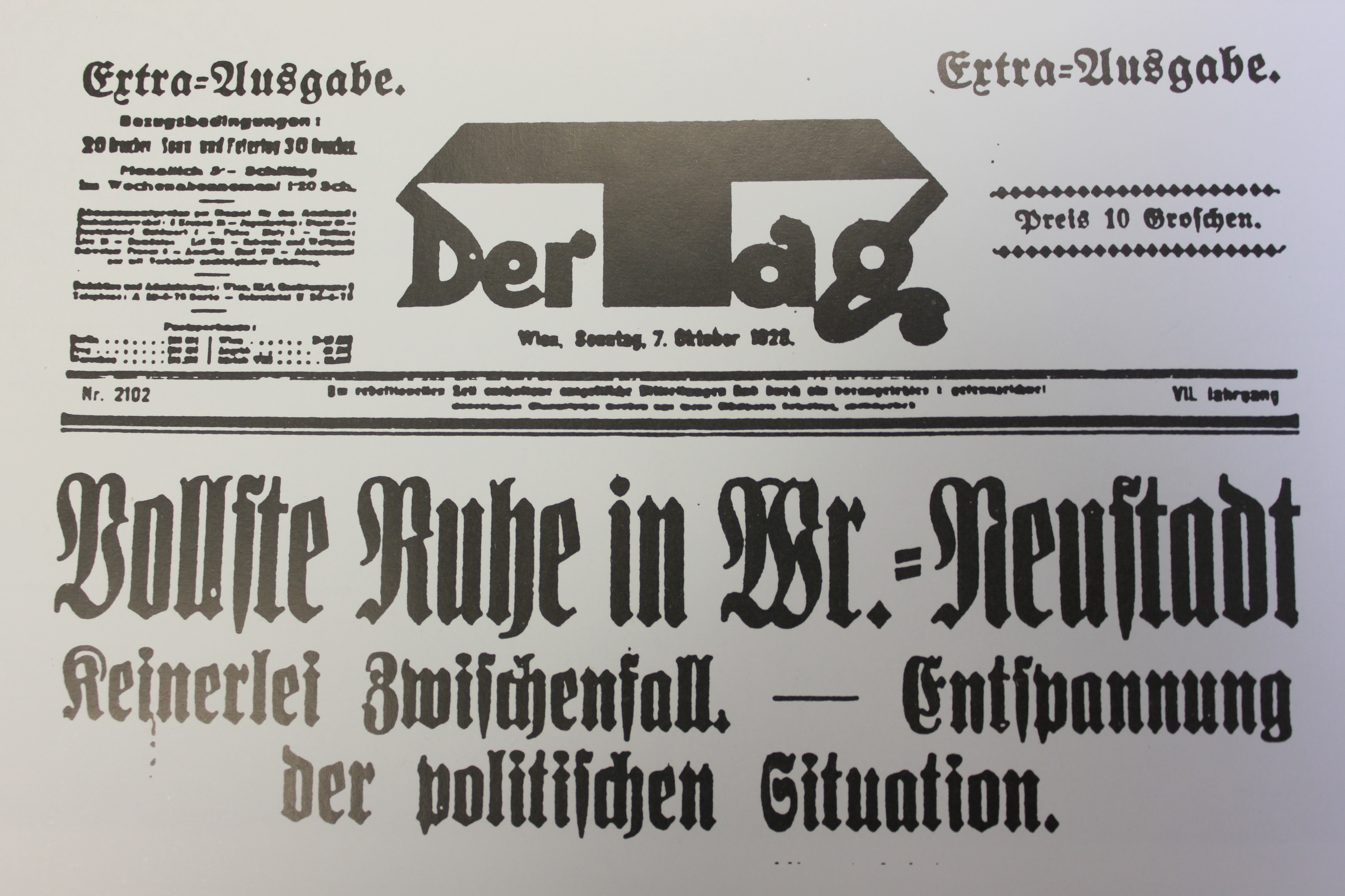 Der Tag, Tageszeitung in Wien, Extra-Ausgabe, 7. Oktober 1928, Aufmarsch der Heimwehr und des Schutzbundes in Wiener Neustadt